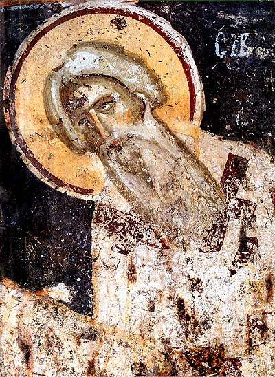 Свети Сава, фреска из XIII века. Црква Светих Апостола, Пећка патријаршија.